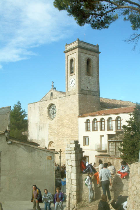 Esglèsia de Sant Marti de Tous, Catalunya.